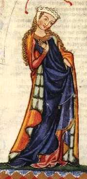 Dame aus der Hochgotikzeit, Ausschnitt aus dem Codex Manesse, fol. 32v